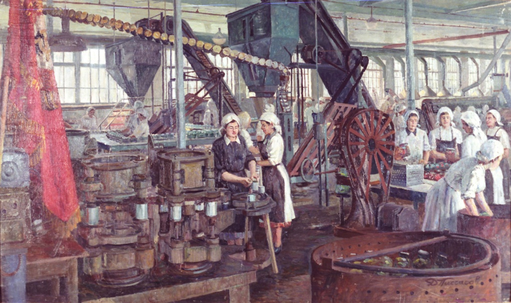 Писчасов Д.И. В Краснознаменном цехе Саранского консервного завода. Середина 1950-х гг. Холст, масло. 60х100